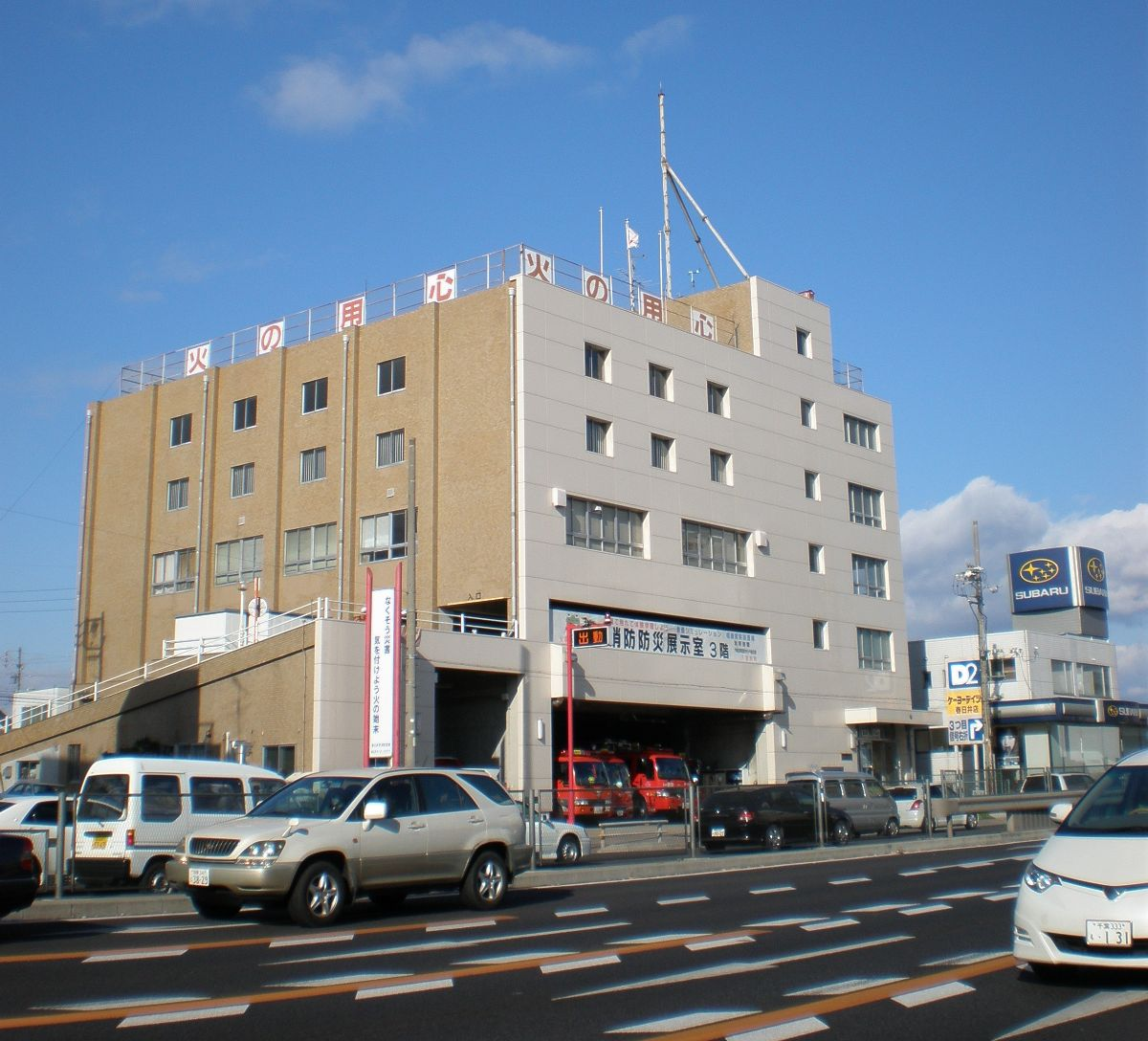 愛知県春日井市にある春日井市消防署